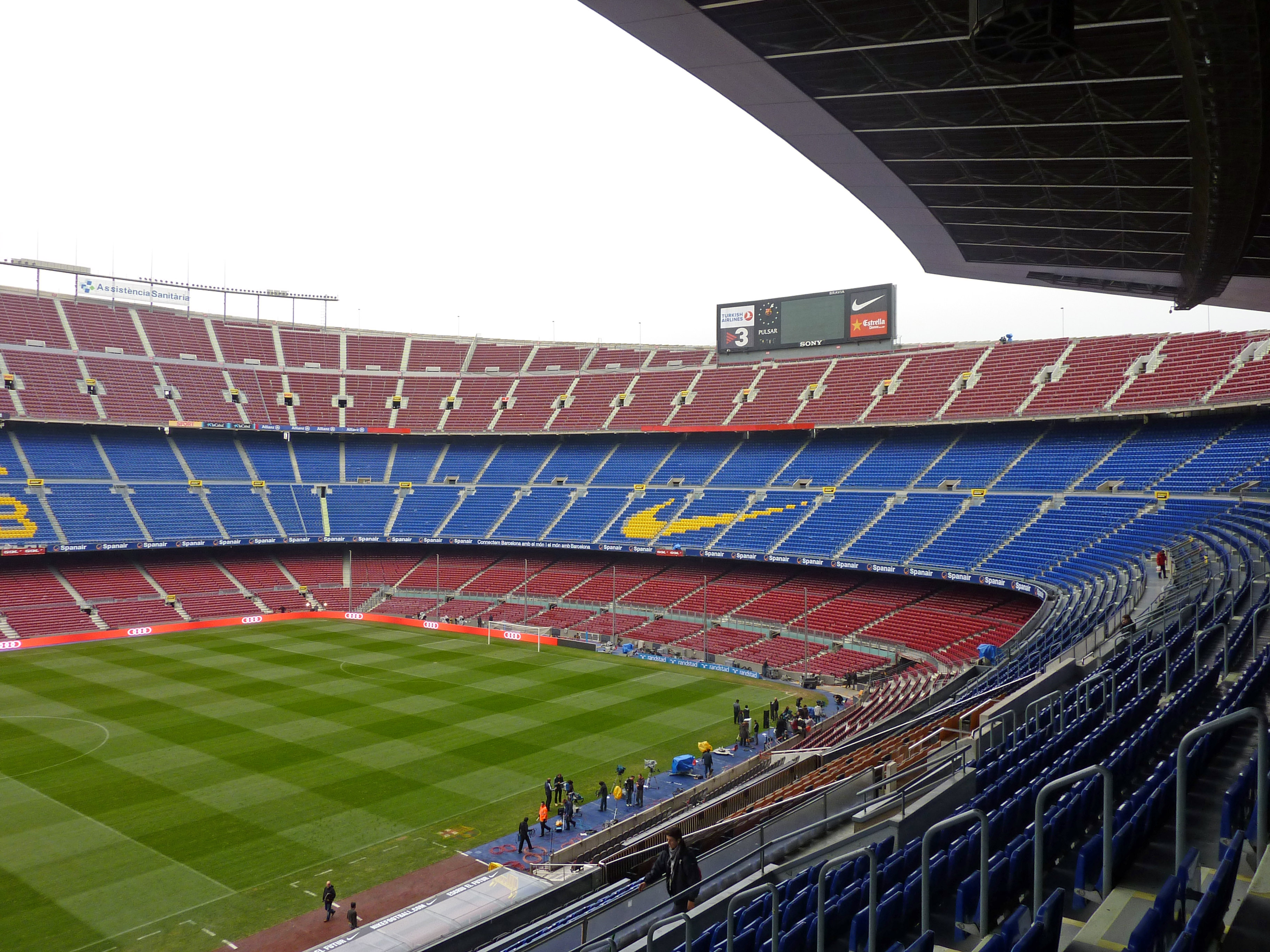 "Camp Nou Experience" Camp Nou Stadium Tour